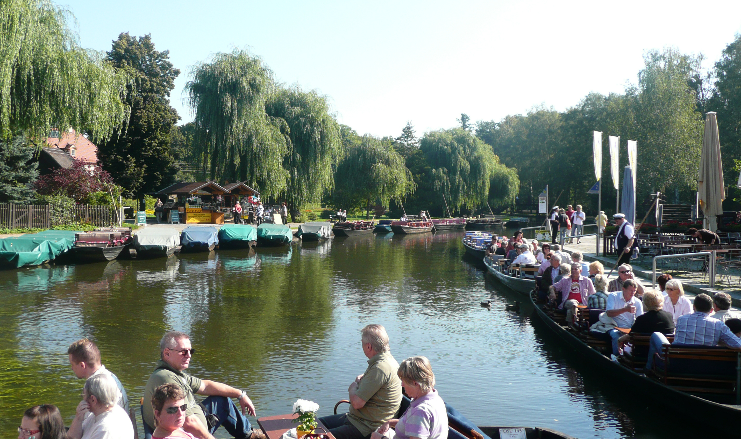 Großer Hafen von Lübbenau